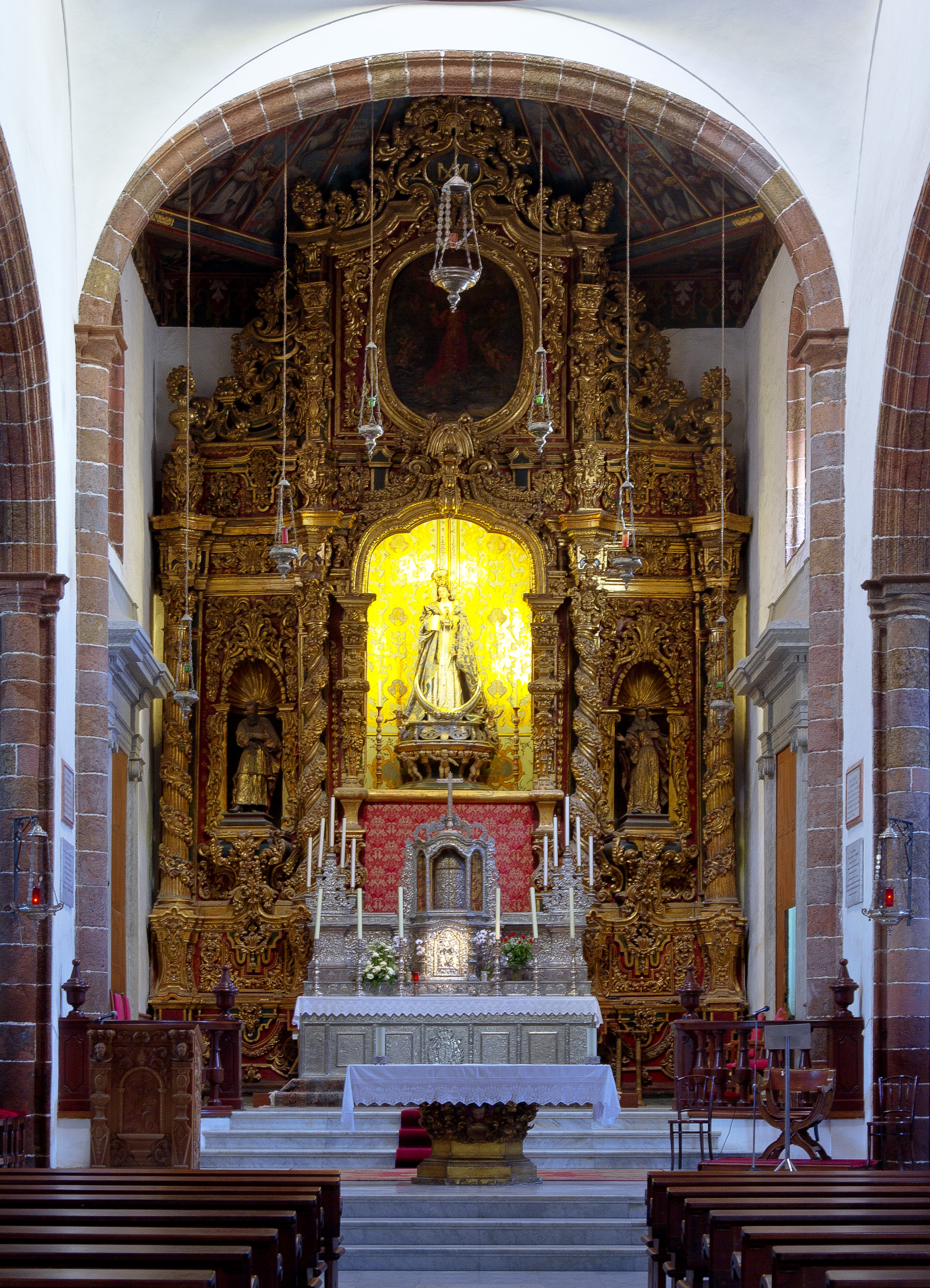 Hauptaltar der Kirche Nuestra Señora de la Concepción in Santa Cruz de Tenerife